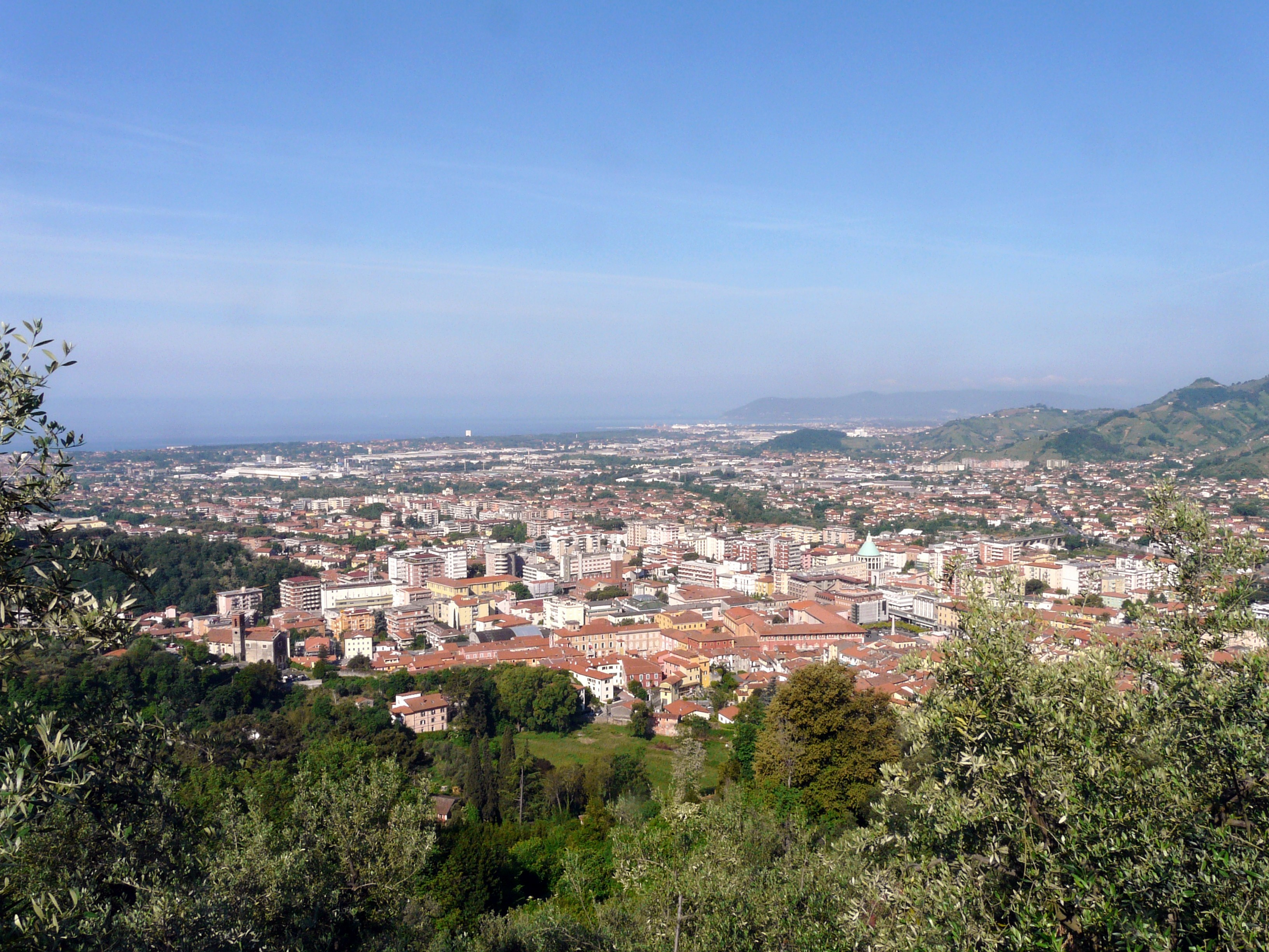 Panorama della città e del territorio comunale di Massa, Toscana, Italia